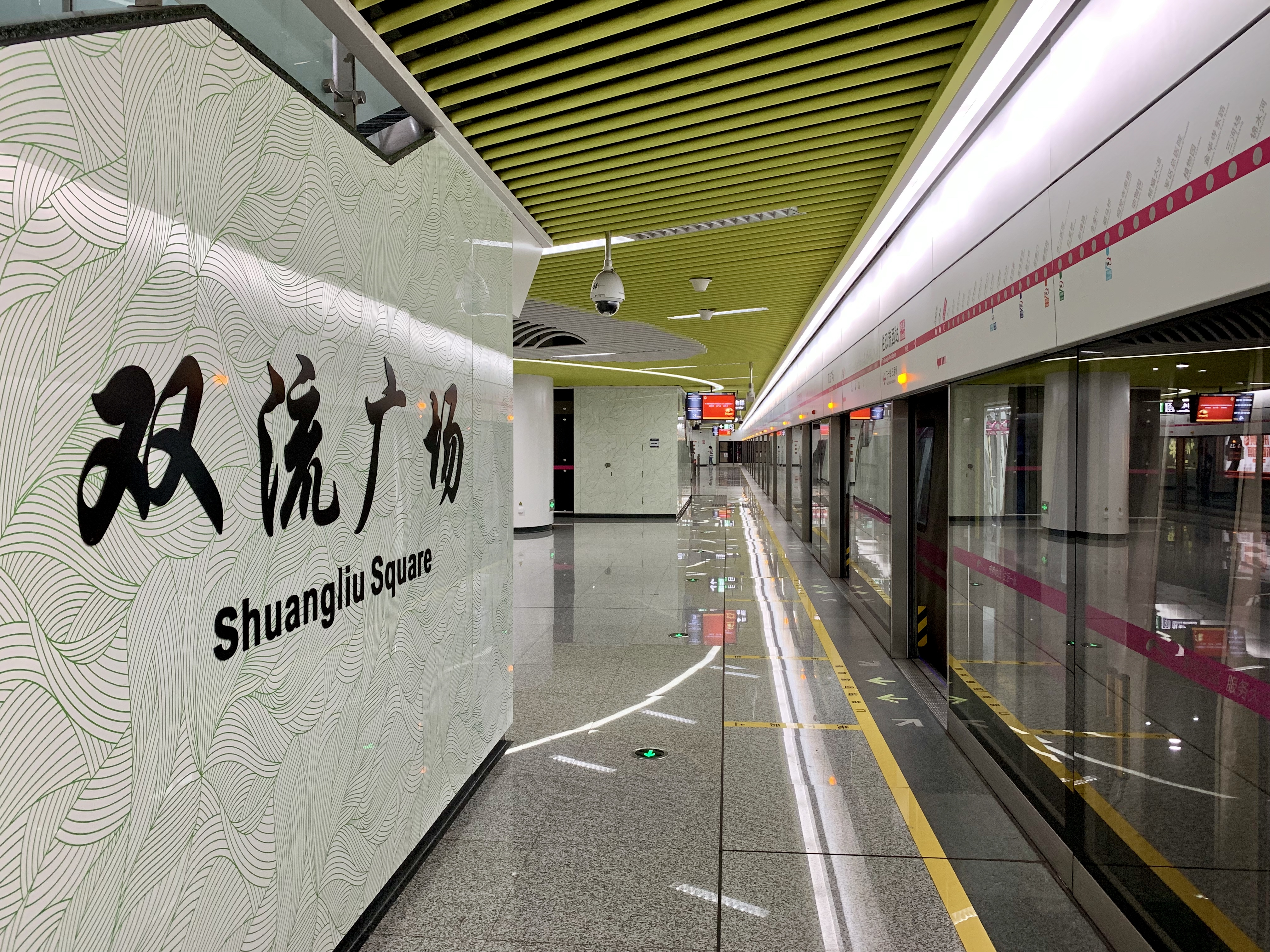 成都地铁双流广场站